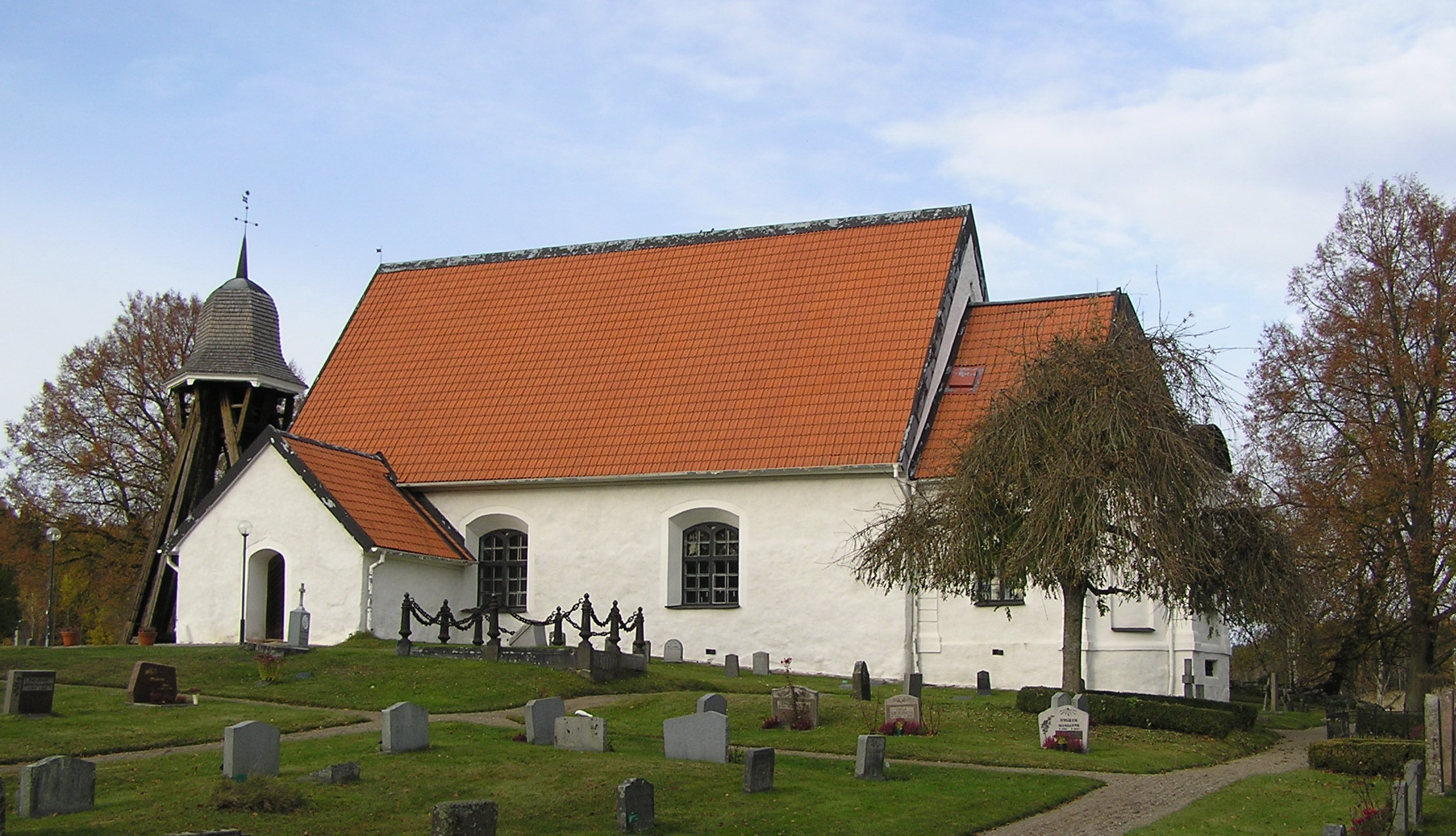 Forssa kyrka, Södermanland. Oktober 2007.